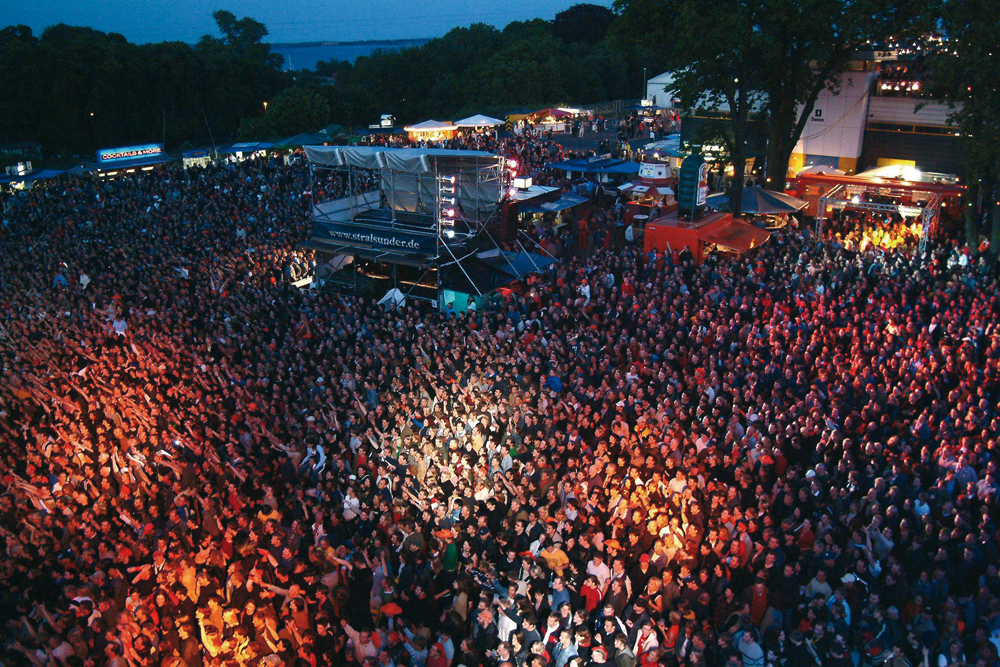 Stralsunder Brauerei-Hoffest